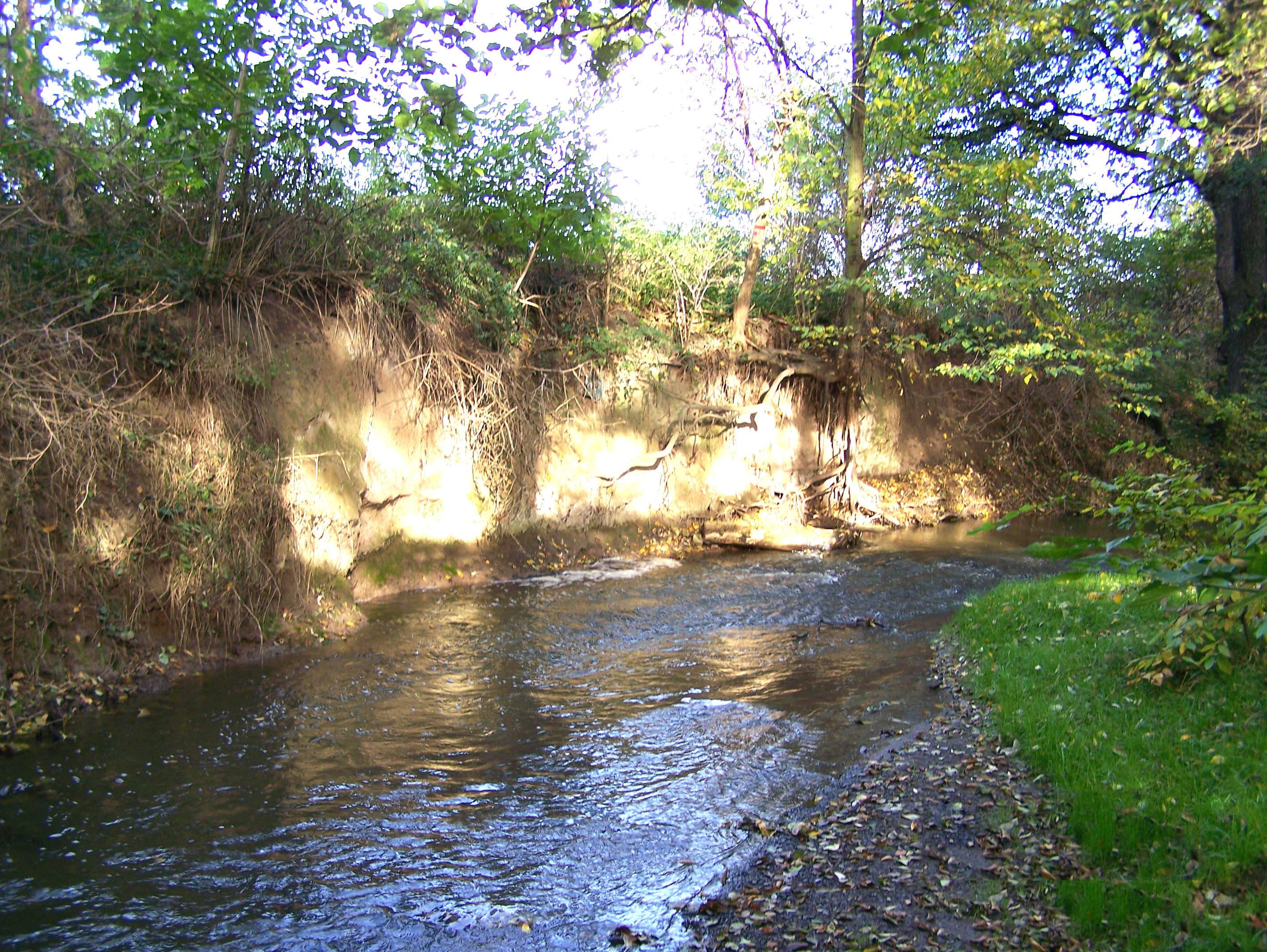 Odkryv aluiálního sedimentu v PP Meandry Botiče